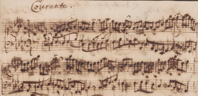 C'est un extrait (en fait le début) de la Courante de la 4e suite française de Bach (BWV 815).